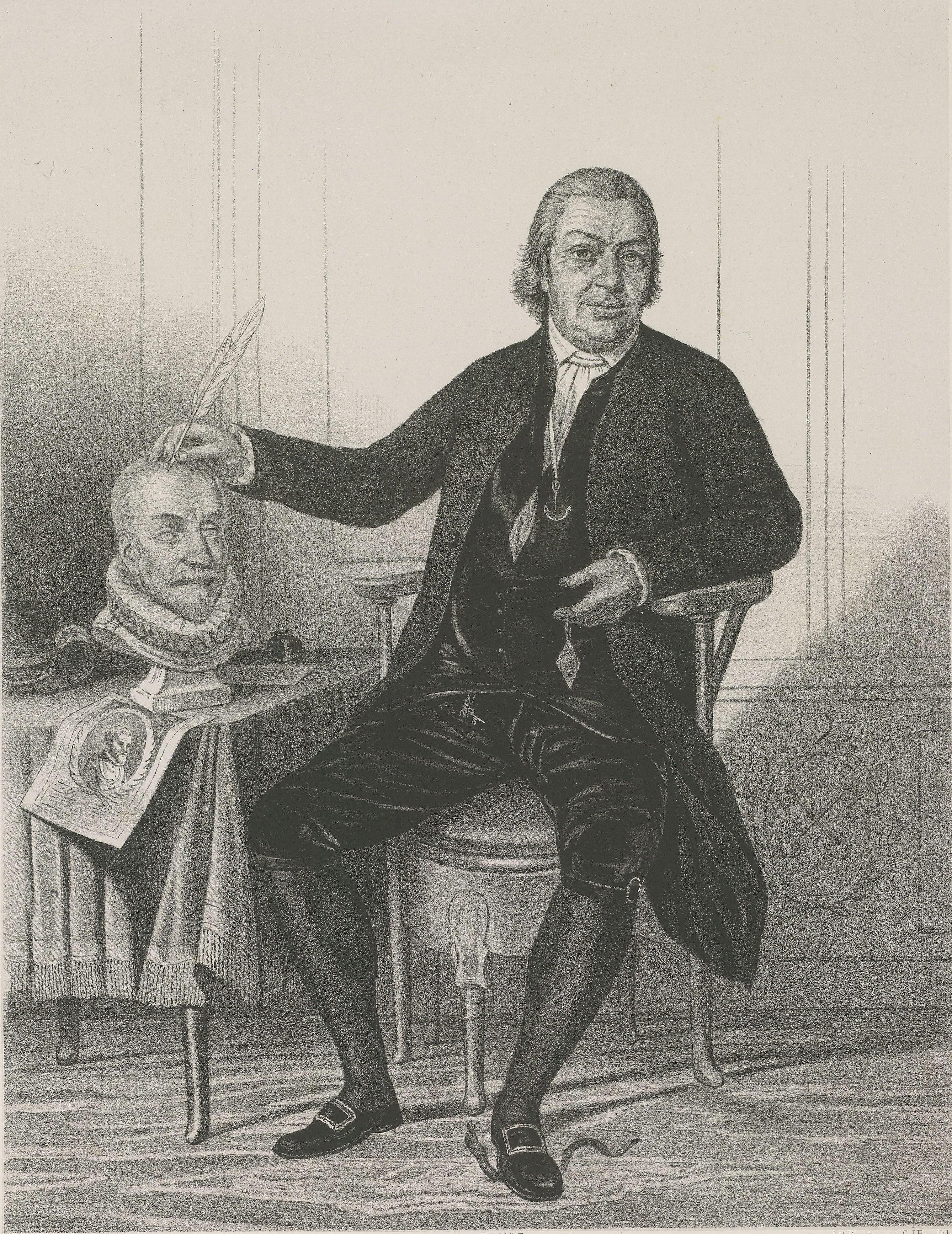 Portret van Johannes le Francq van Berkhey (Leiden 1729-1812). Arts, lector in de Natuurlijke Historie, letterkundige. Ten voeten uit, links, het hoofd rechts, zittend naast een tafel, waarop een borstbeeld van Willem van Oranje en een prent met daarop de Leidse burgemeester Van der Werff. Met de voet vertrapt Le Francq van Berkhey een adder (de Patriottische Partij). Prent (steendruk door P.W.M. Trap) uit de periode 1830-1870 door de lithografen Gerard Bos en Johann Berghaus naar een pastel van Rienk Jelgerhuis uit ca. 1785.